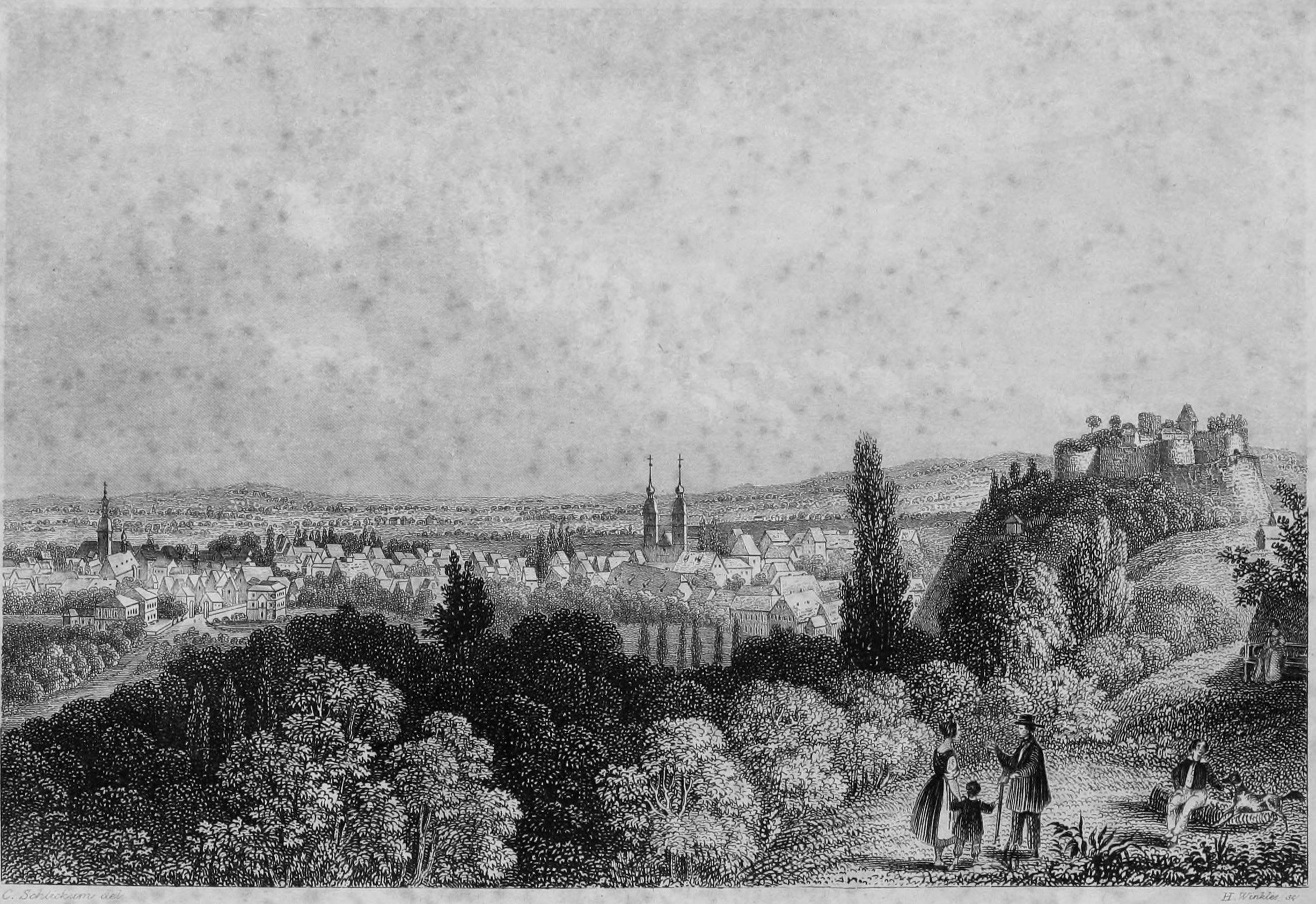 Bielefeld um 1840